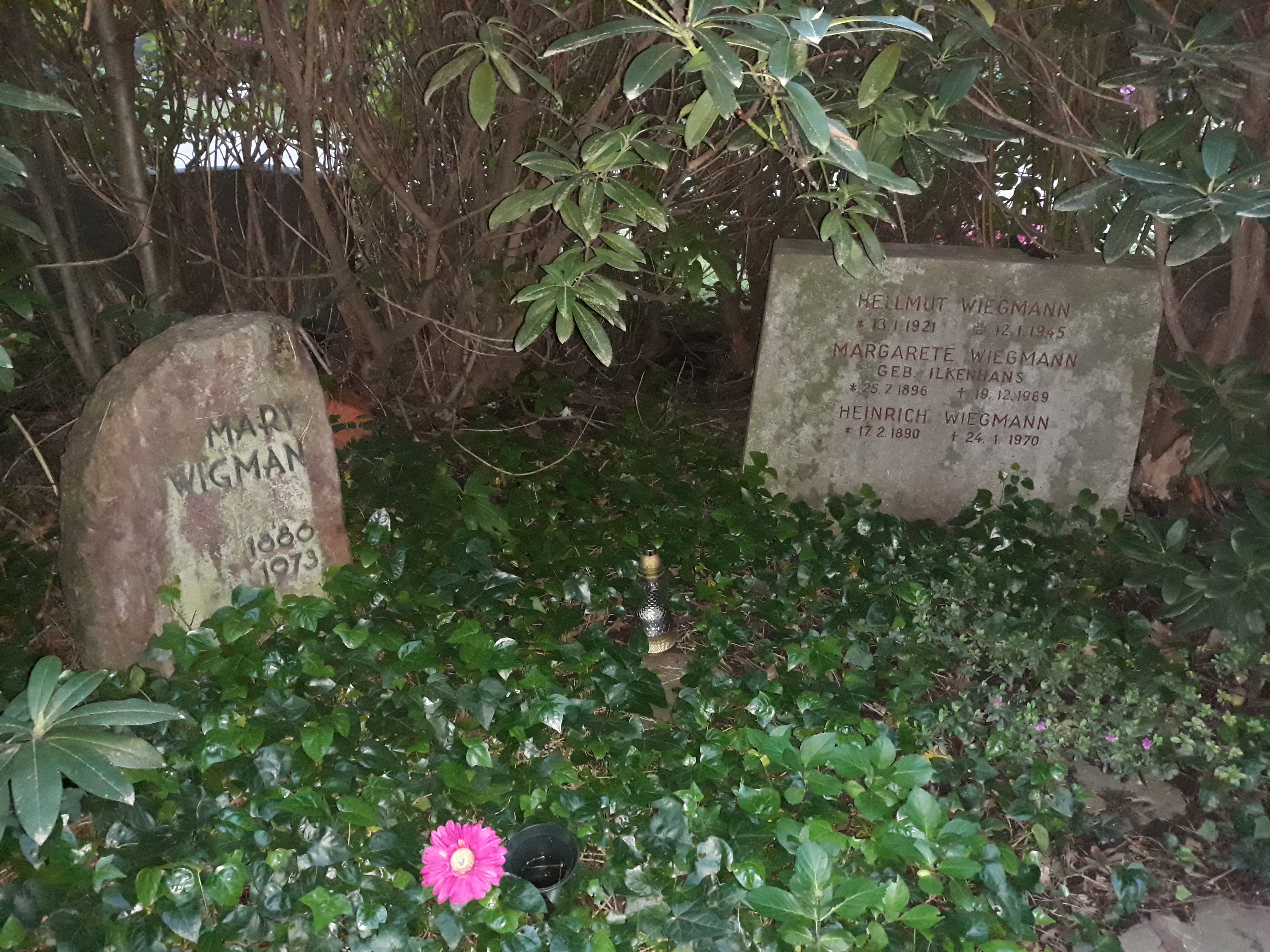 Das Grab der deutschen Ausdruckstänzerin Mary Wigman (eigentlich Wiegmann) im Familiengrab Wiegmann auf dem Ostfriedhof Essen.